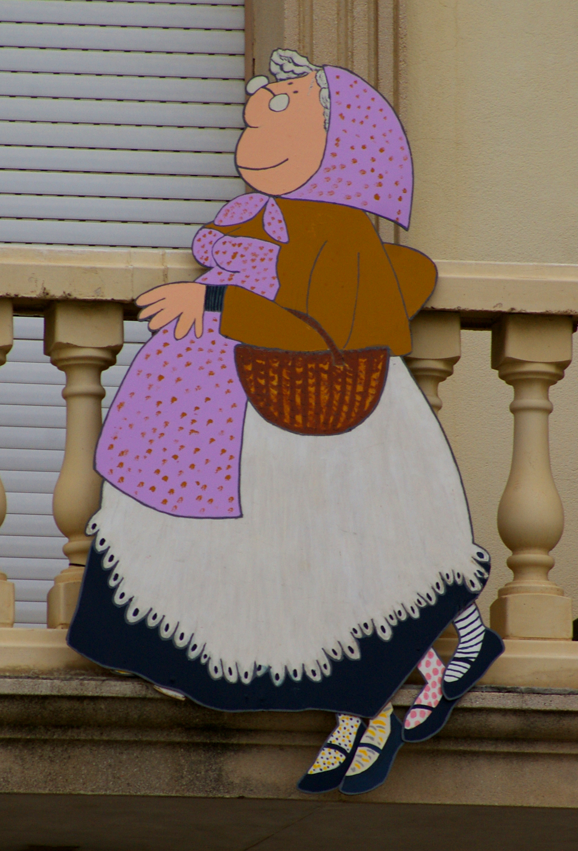 Representació de la Vella Quaresma a l'Ajuntament de Vilassar de Mar (El Maresme, Catalunya)